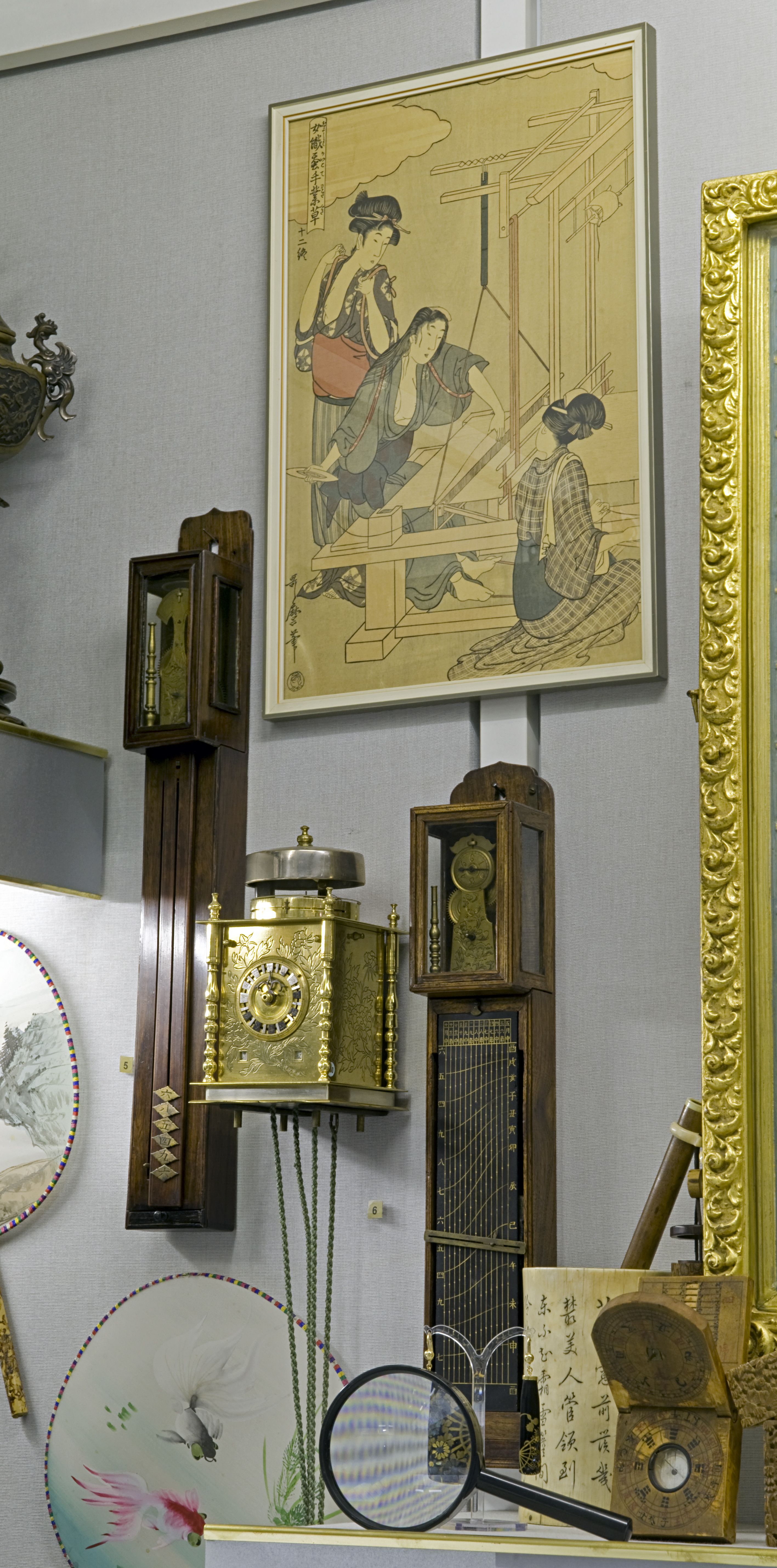 Museum für Uhren, Schmuck und Kunst Frankfurt am Main Japanische Uhren